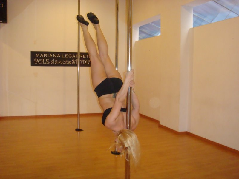 Pole dance na barra vertical